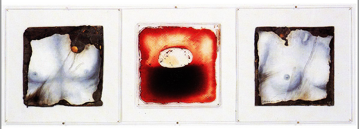 Exposition Bloodbrothers 1993